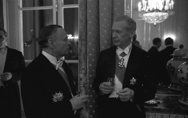 Einweihung der deutschen Botschaftsresidenz, Palais Beauharnais, in Paris: Empfang für Staatspräsident de Gaulle mit Bundespräsident Lübke.